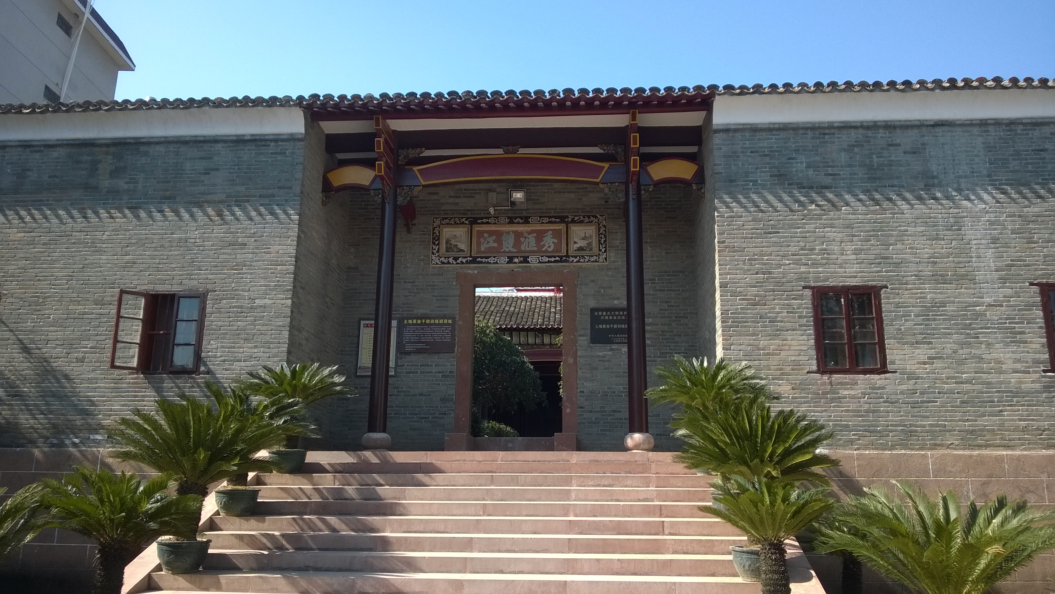 潋江书院正门